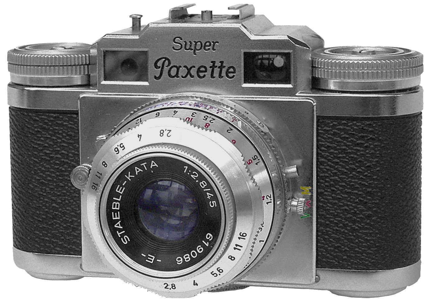 1955 brachte Braun Nürnberg als Weiterentwicklung der bis dahin sehr erfolgreichen Paxette die Super Paxette I und die Super Paxette II den Markt. Das Neue war bei beiden der gekuppelte Entfernungsmesser. Während aber das Modell I über eine fest eingebaute Optik verfügte, konnte man beim Modell II die Optik wechseln. Der abgebildete Apparat ist eine Super Paxette I mit dem Staeble Kata 1:2,8/45 mm. Ich muss sagen, dass mir von allen meinen Kameras aus den Fünfzigern diese Super Paxette die liebste ist. Keine liegt so ?sympathisch? in der Hand ... wunderbare Haptik, wie man ja heutzutage sagt.